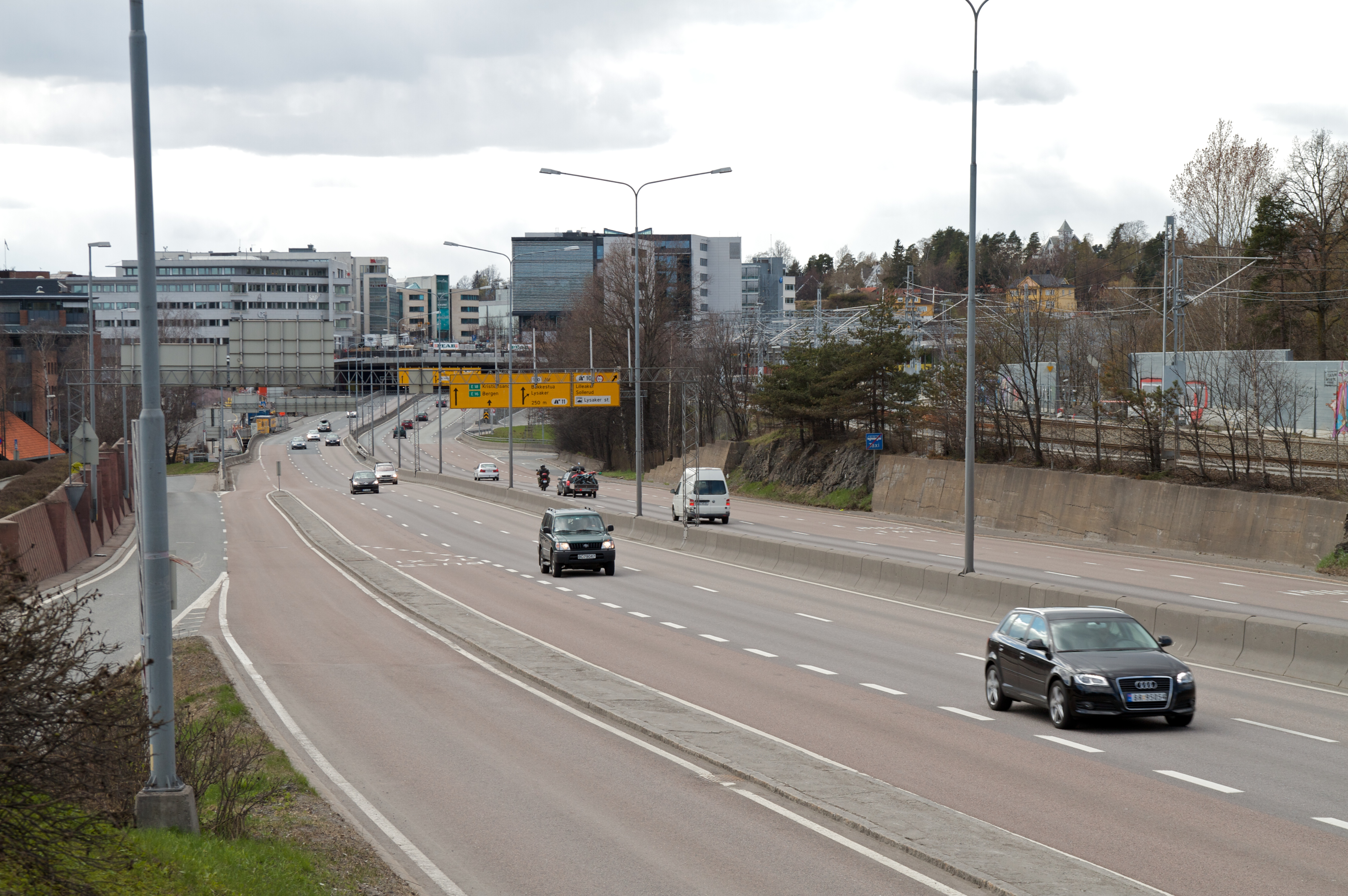 E18 (Drammensveien) på Sollerud / Lysaker.